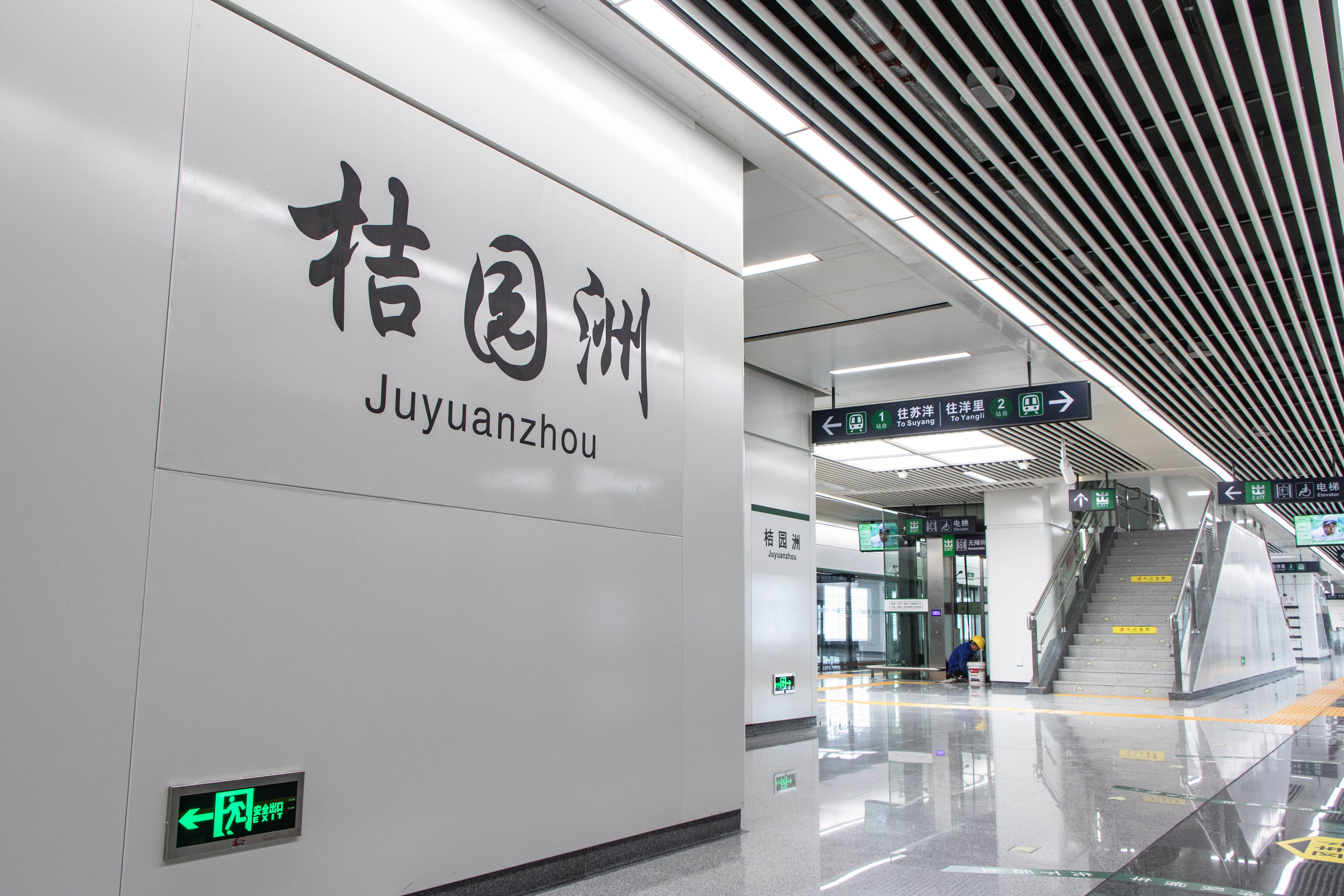 中文（中国大陆）: 福州地铁2号线桔园洲站